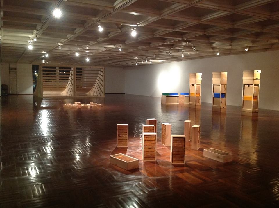 Recent work II, Museo Nacional de Artes Visuales (national Museum of Visual arts) Uruguay, Variable dimentions